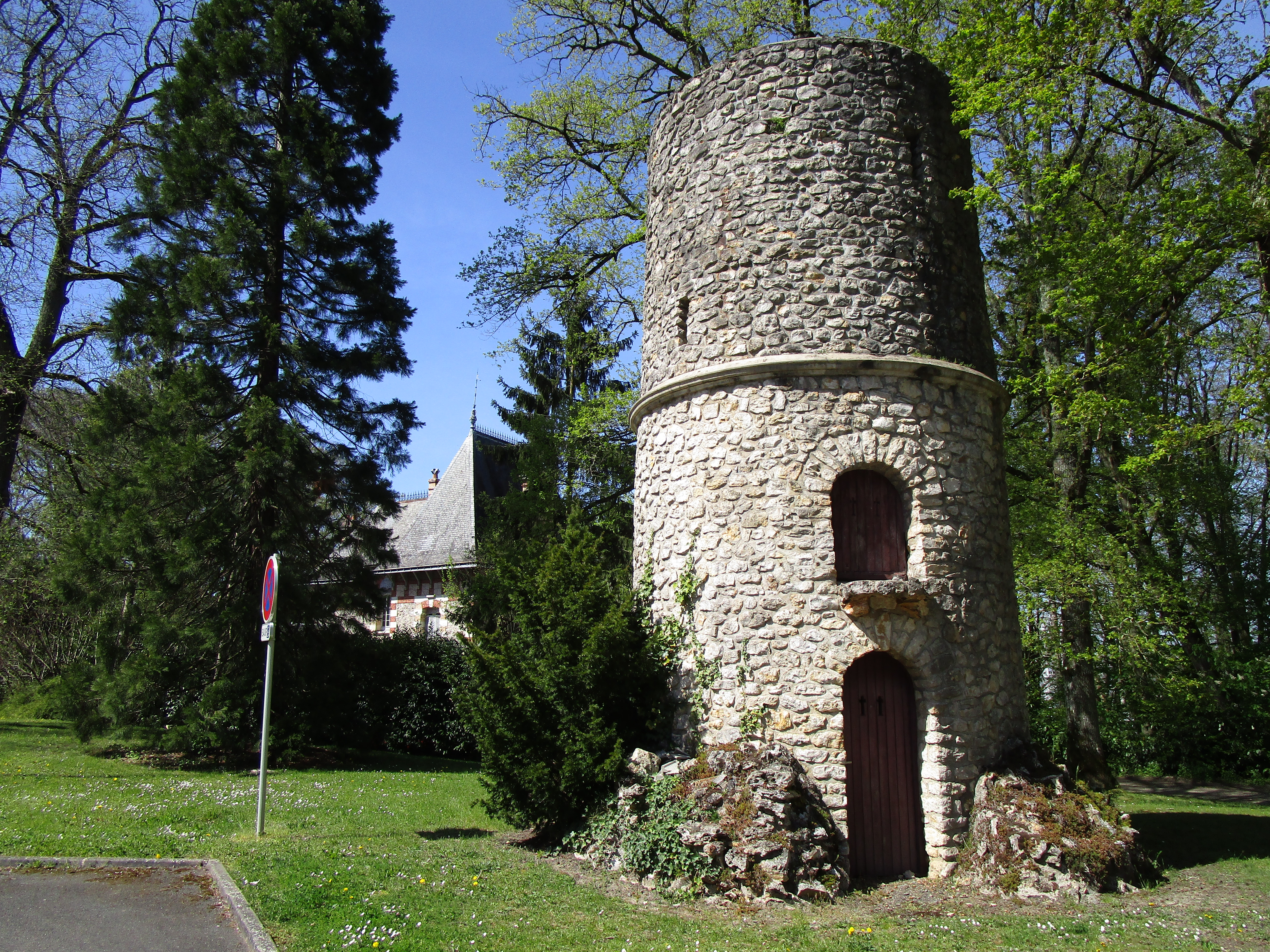 Tour à proximité du manoir de Montjoyeux, à Tours